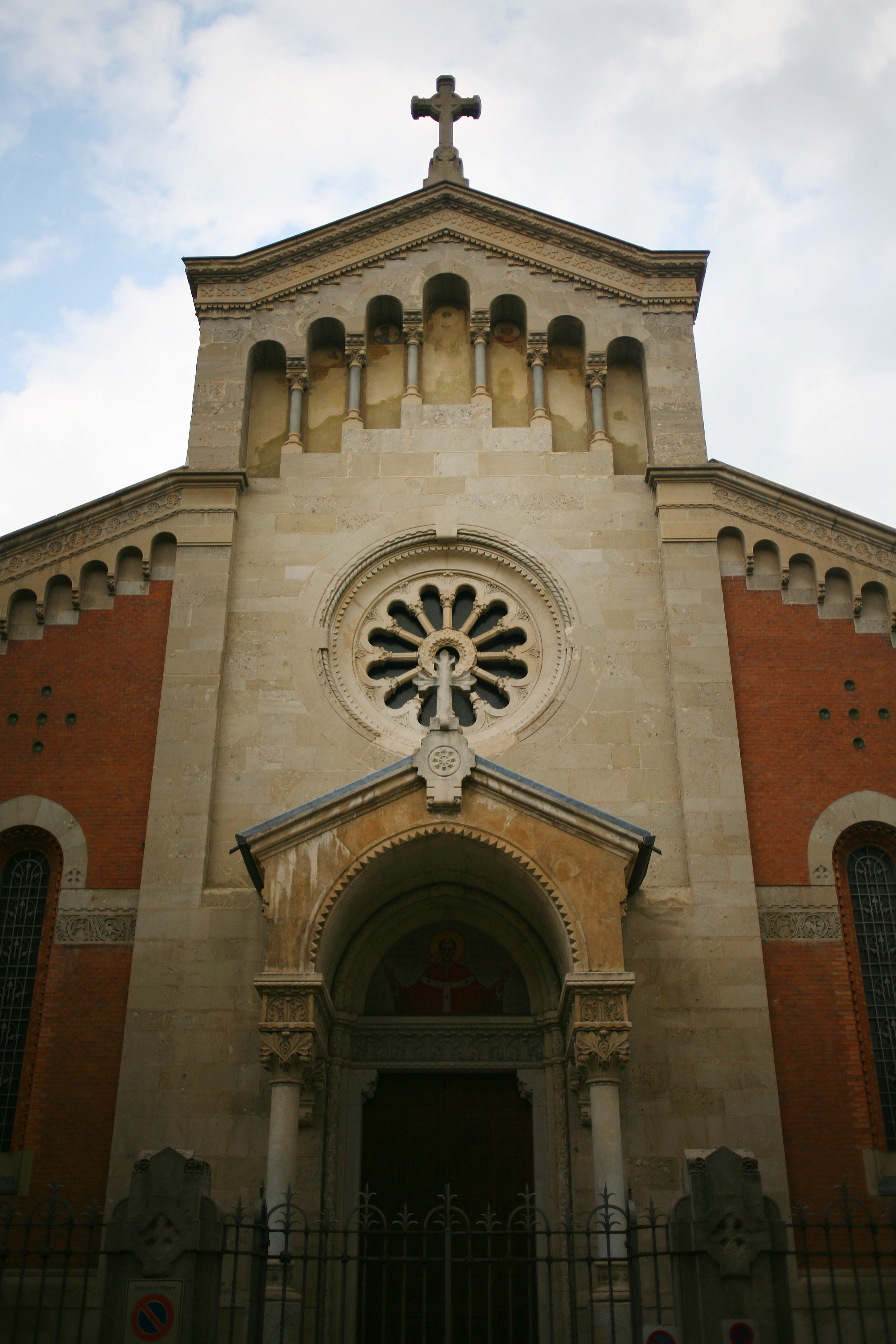 Facciata della chiesa di San Gregorio Magno, via San Gregorio a Milano; ex chiesa del Foppone di San Gregorio, dietro al Lazzaretto.